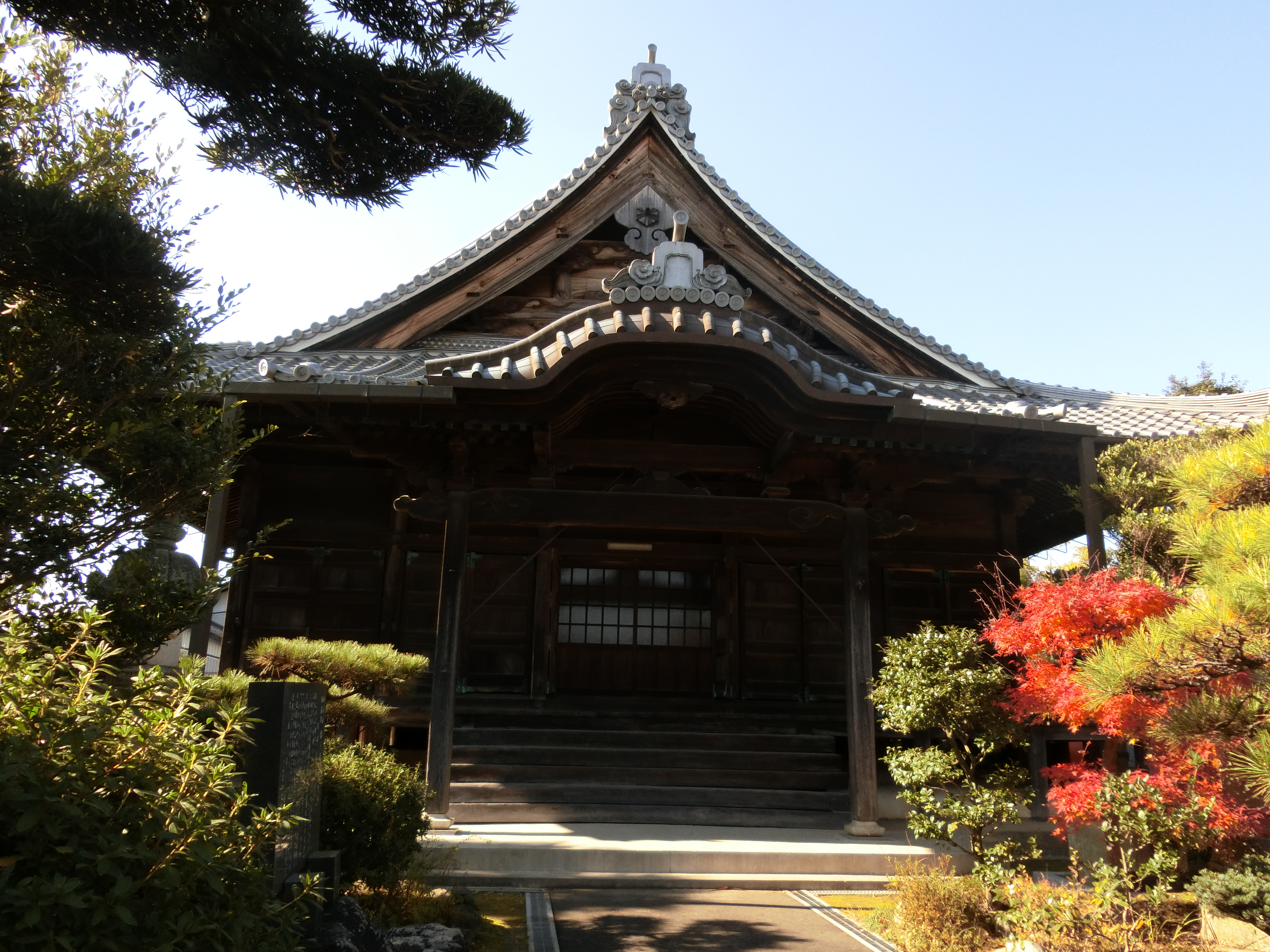 岐阜県羽島市にある永照寺。 岐阜県の指定文化財である本堂。